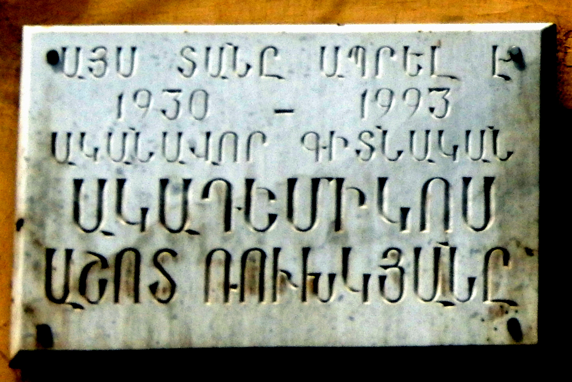 Ashot Rukhkyan's plaque